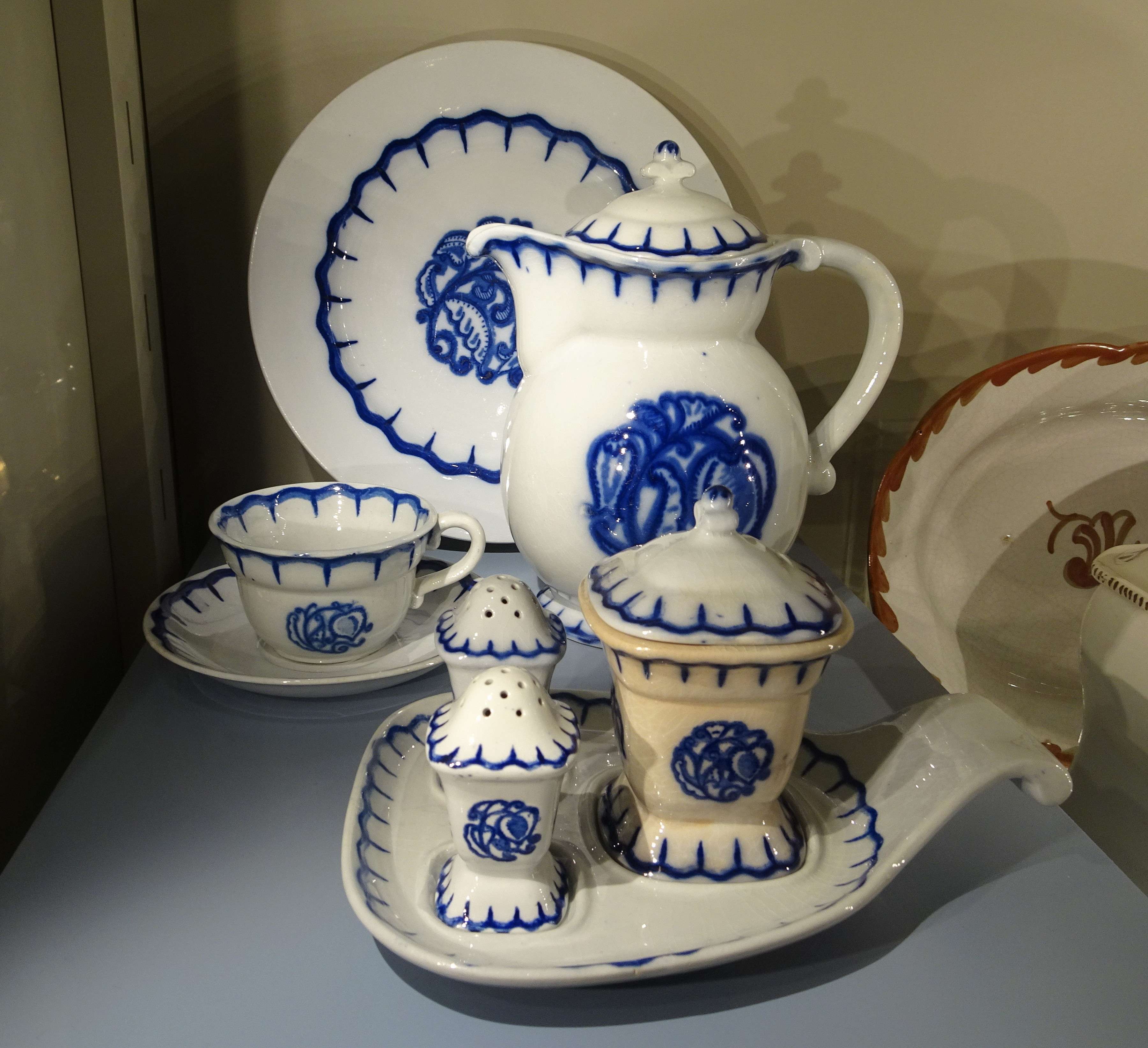 Porslin "Liljeblå" av Wilhelm Kåge till Hemutställningen 1917, utställd på Nationalmuseum Stockholm